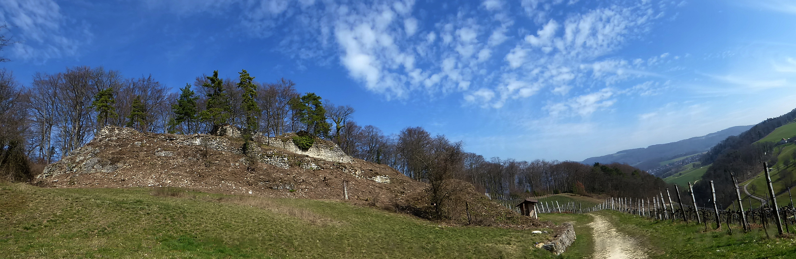 Ruine Frohberg, Aesch, Basel-Land, Schweiz